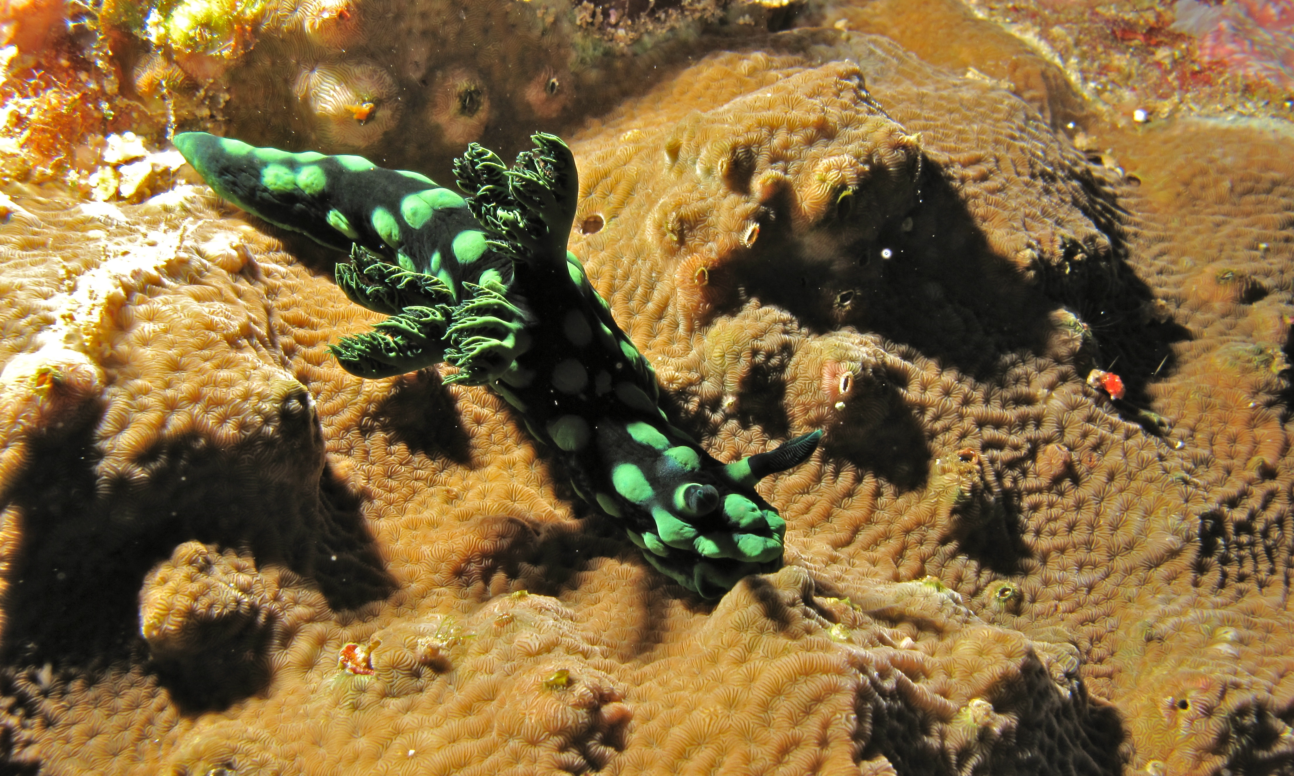 Likuan II, Bunaken Island, Sulawesi, INDONESIA